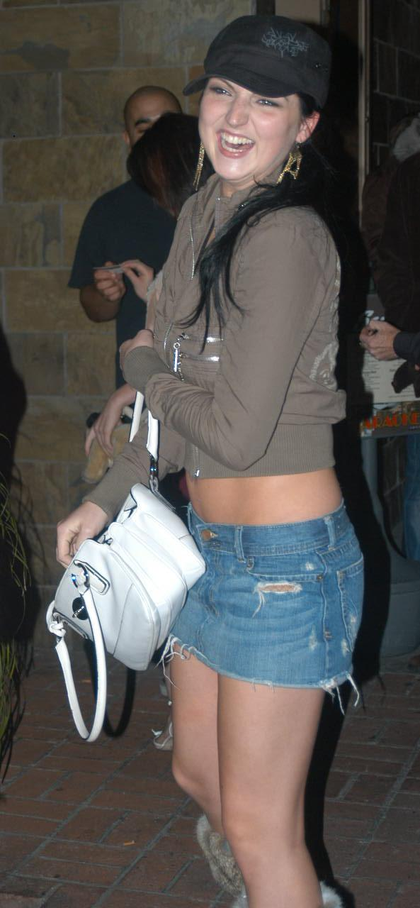 Nov 8 2005: Porn Star Karaoke